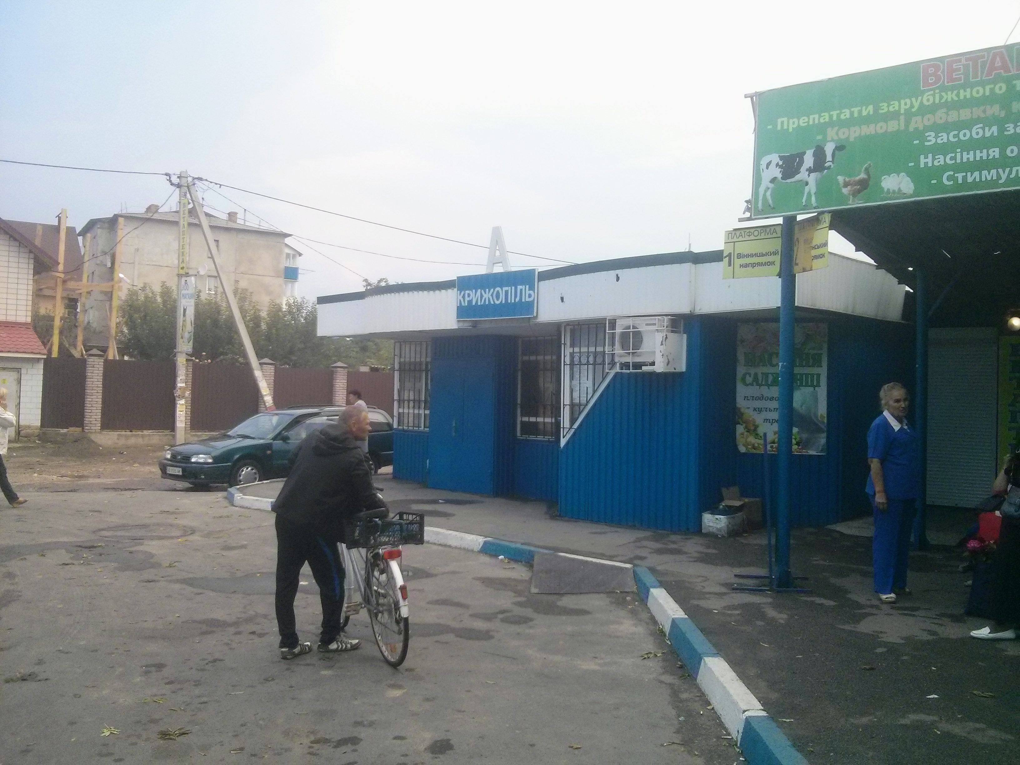 Автобусний вокзал у смт. Крижопіль, Вінницька область Вересень 2017 року